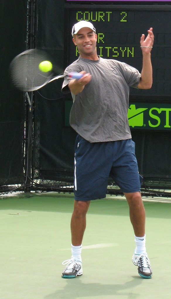 James Blake, Miami, Florida, 2007